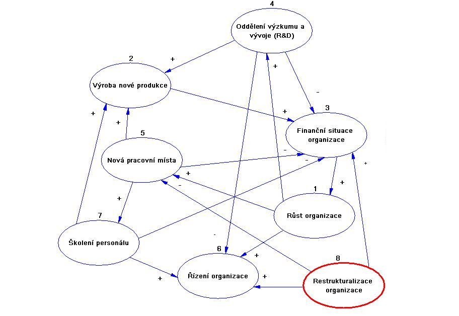 upravený obrázek z: autoři: Ю.Ф. Тельнов, А.П. Цыбин